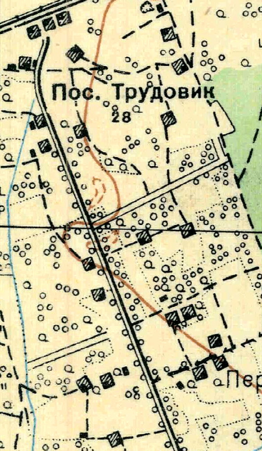 Топографическая карта Ленинградской области, квадрат О-35-24-Б-а (Переярово), деревня Трудовик